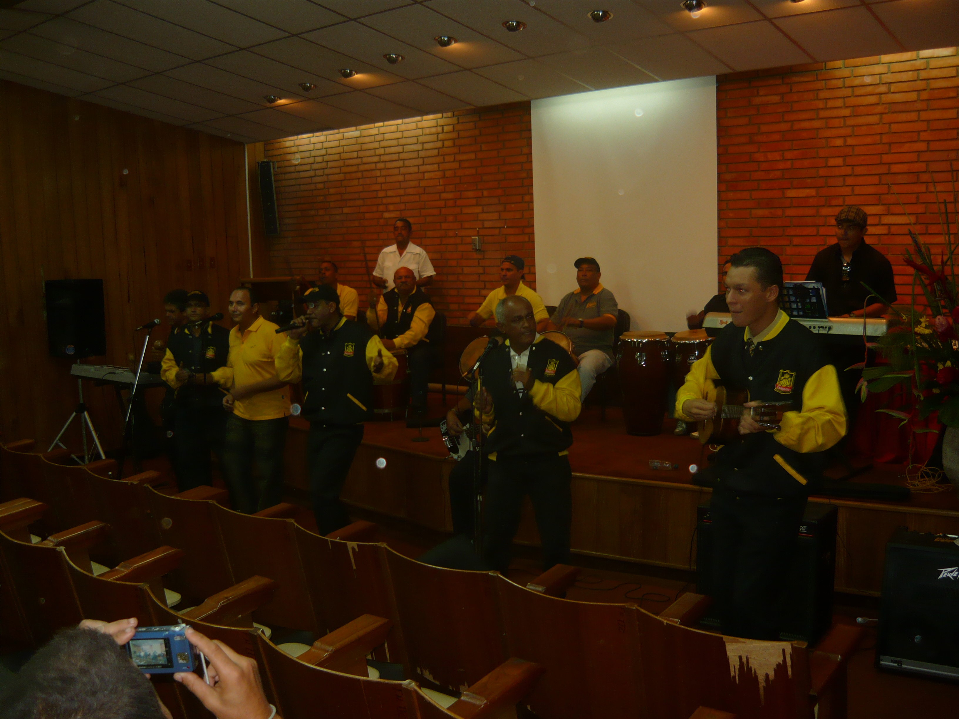 Presentación de Saladillo en el Teatro Baralt